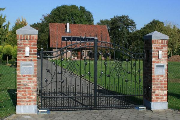 Ländliches Wohnhaus in Wegberg-Venn